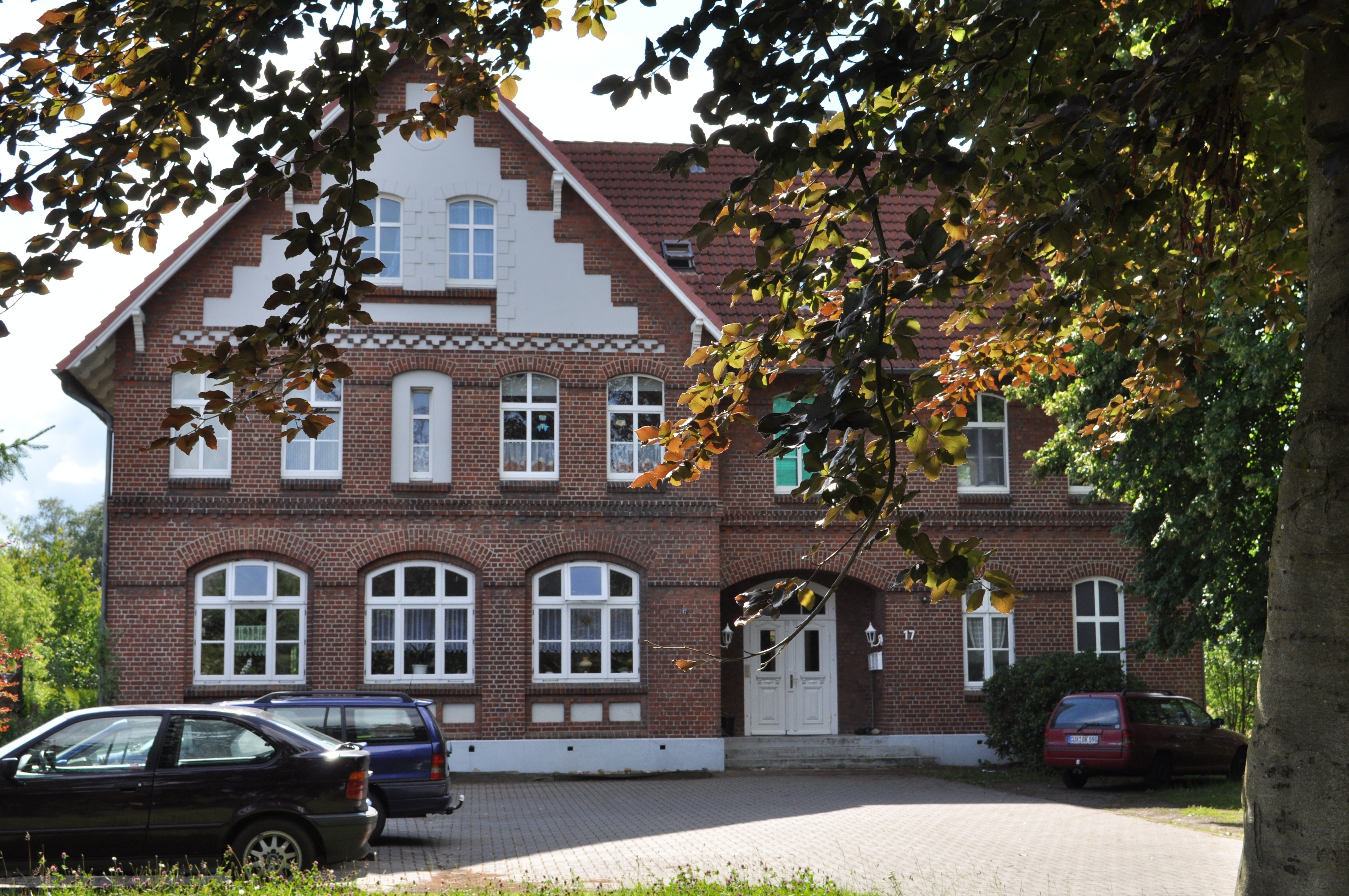 Ehemalige Schule Cuxhavener Straße 17 in Hemmoor-Althemmoor. This is a photograph of an architectural monument. .202.200.002